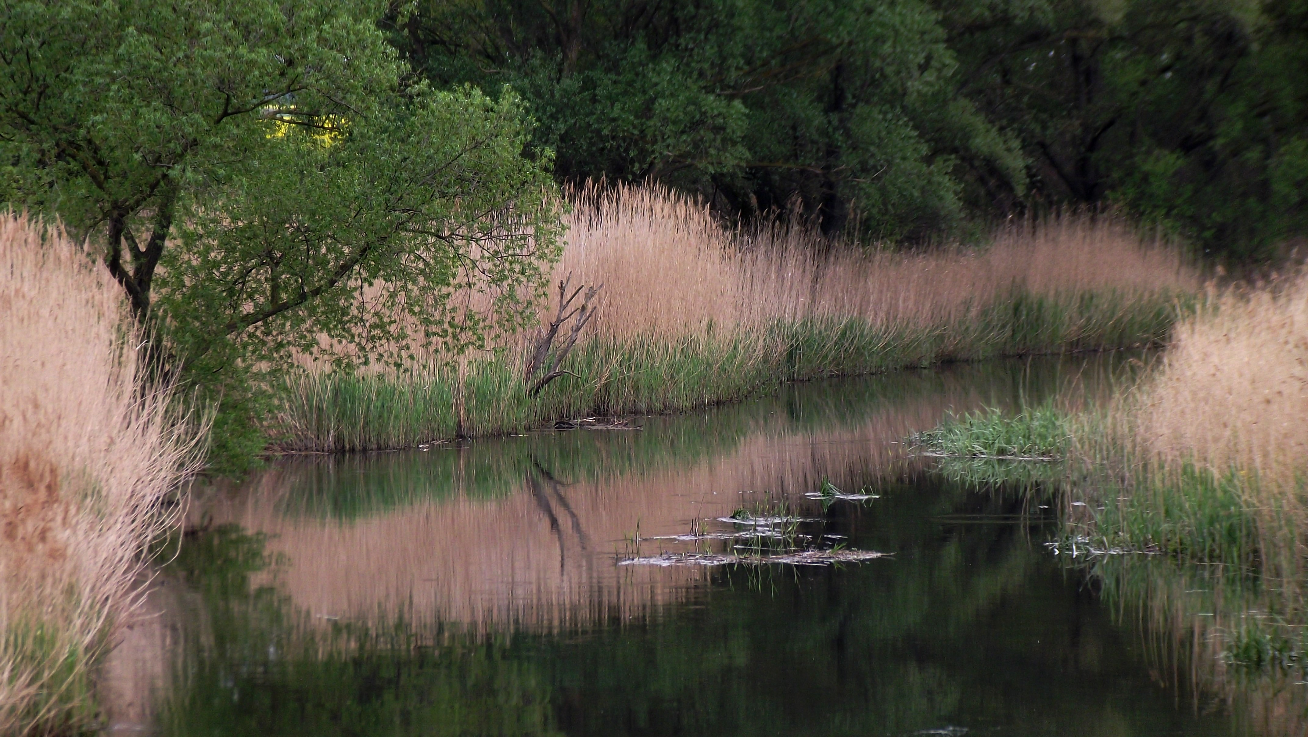 A Marcal folyó a Csikvándi-Bakony-ér befolyásával, a mórichidai Szentei hídról 2014 tavaszán.